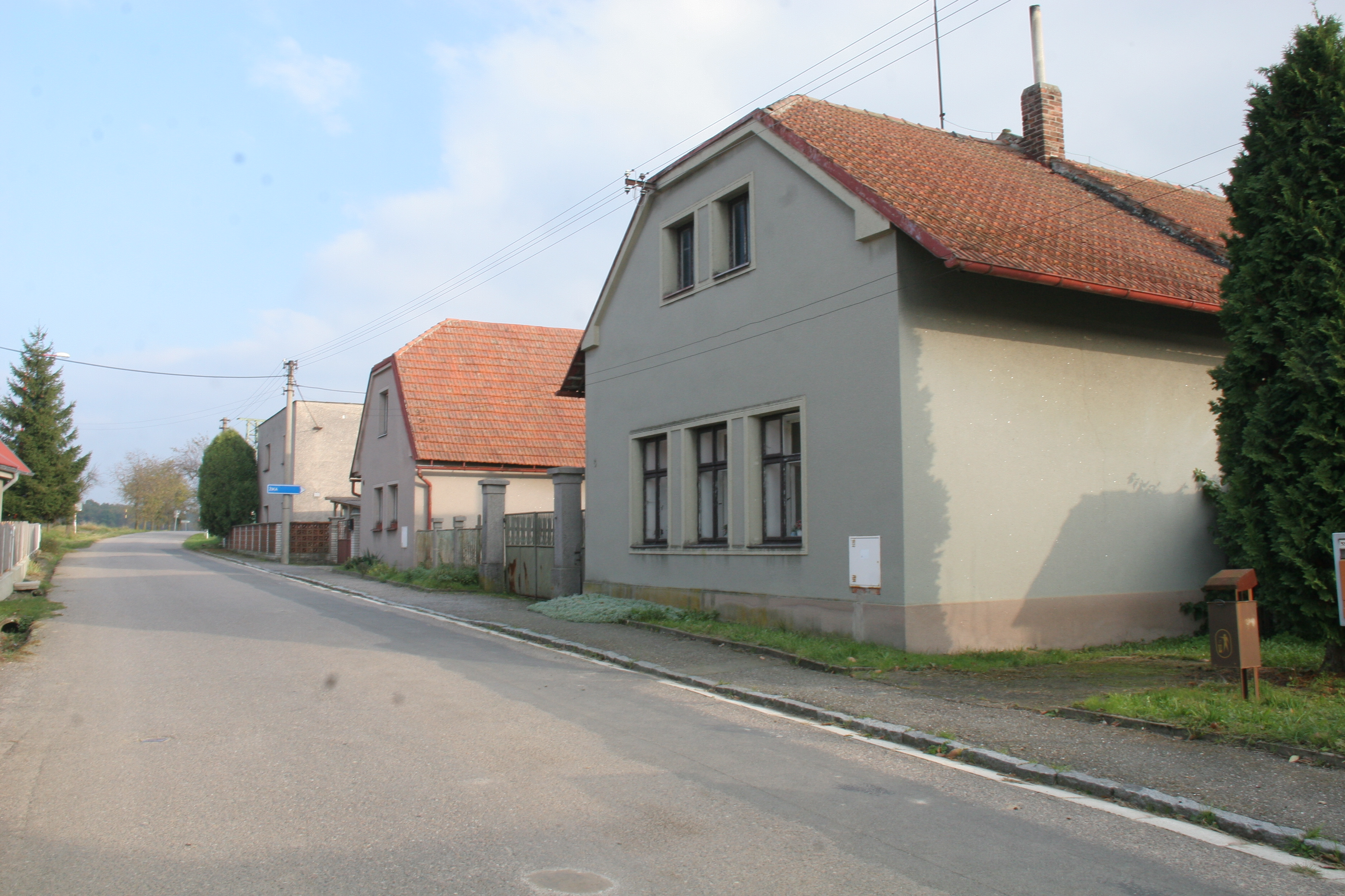 Franclina čp. 5